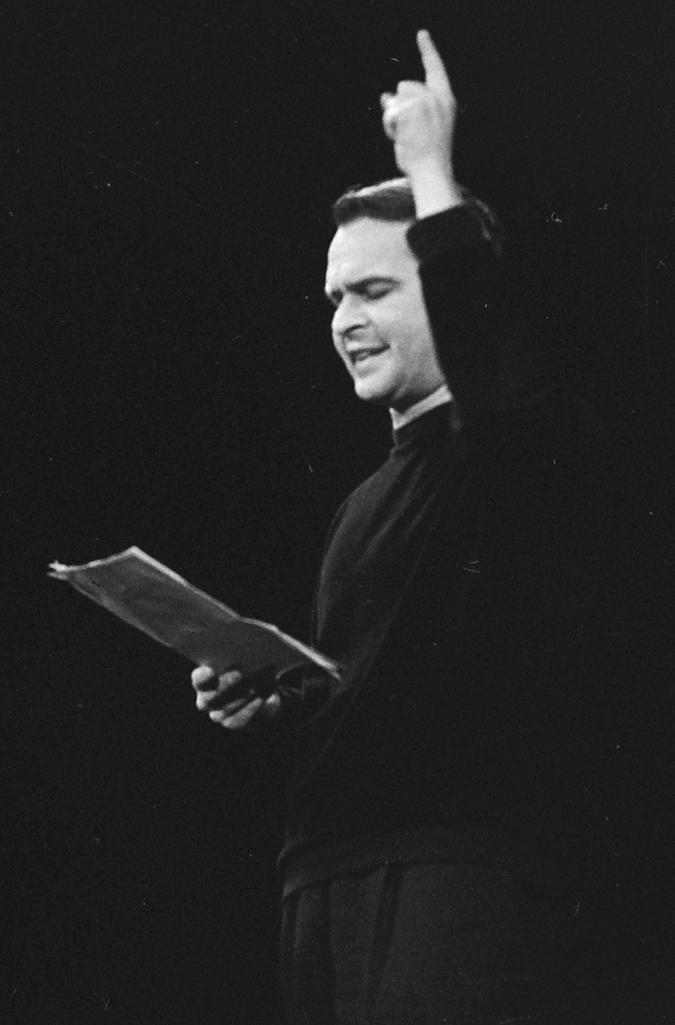 Latinovits Zoltán (Budapest, 1931. szeptember 9. – Balatonszemes, 1976. június 4.) Kossuth-, Jászai Mari- és Balázs Béla-díjas magyar színész. A magyar nemzet legnépszerűbb színészeinek egyike, sokan úgy is nevezik: „a Színészkirály”.